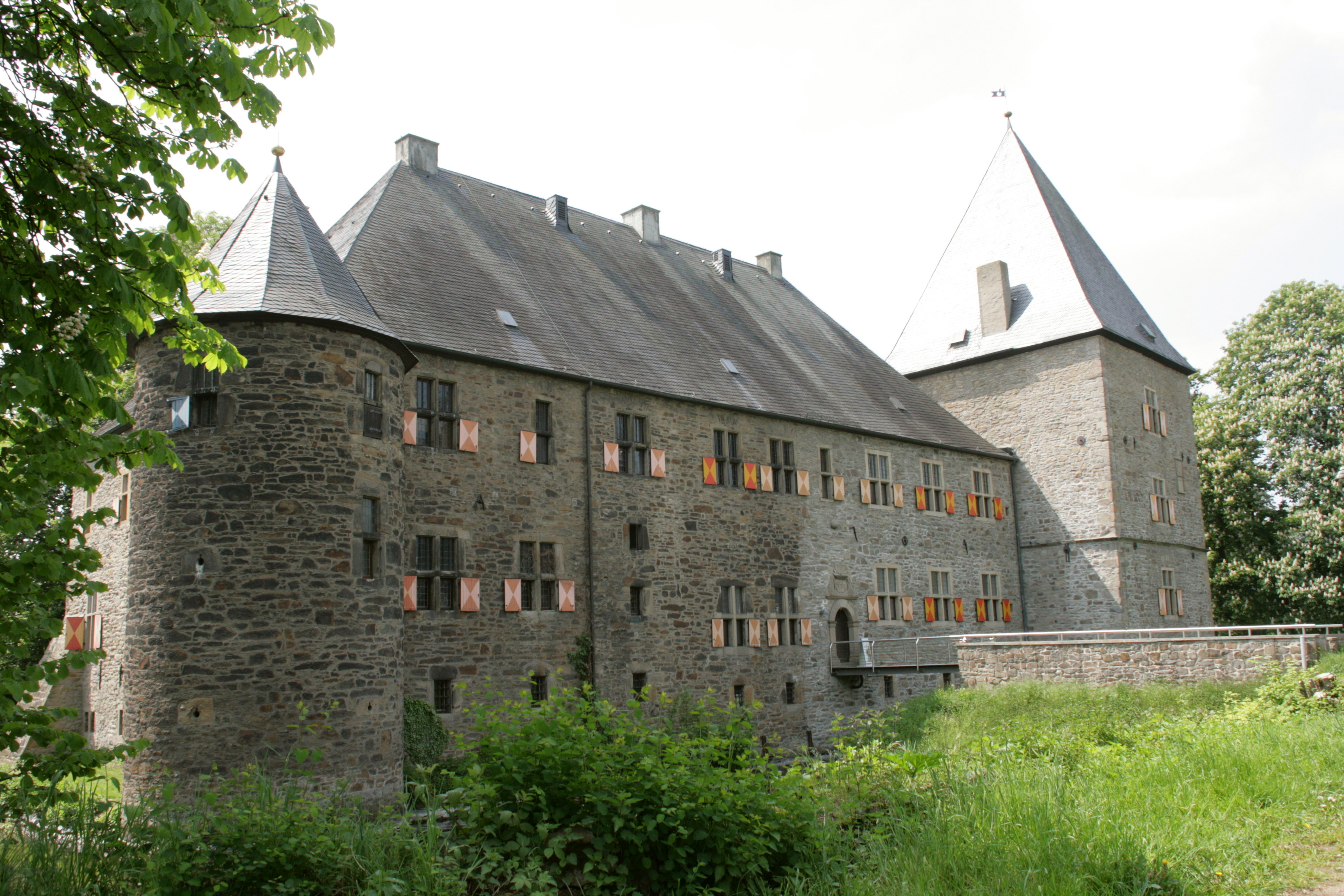 Haus Kemnade, An der Kemenade 10 in Hattingen-Blankenstein